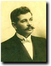 Floro Bartolomeu.